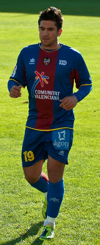 El jugador granota Xisco Muñoz